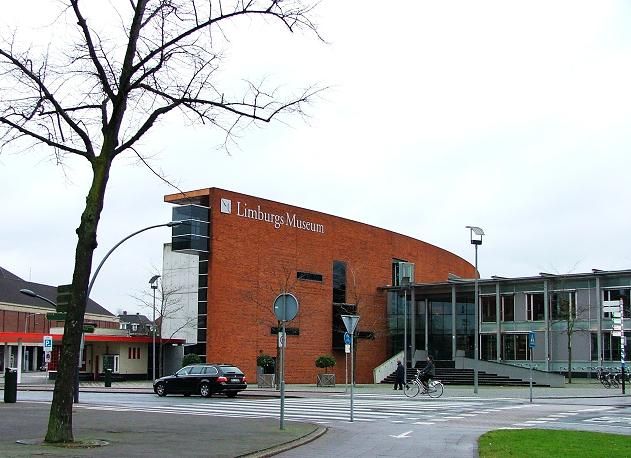 Muzeum Limburskie w Venlo (Holandia)